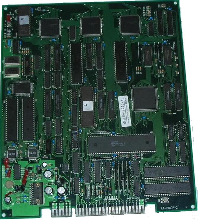 DonPachi arcade PCB